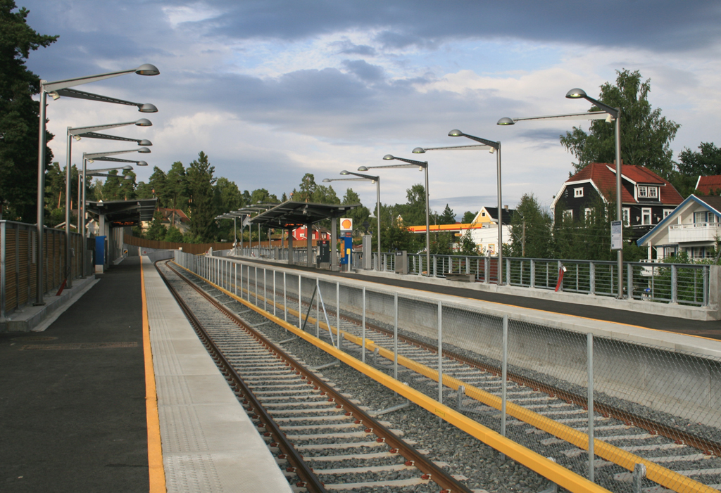 Bjørnsletta T-banestasjonen fra plattformen mot Jar, men i billedretning mot Åsjordet stasjon.